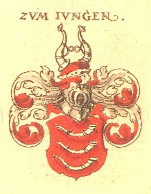 Wappen der Frankfurter Patrizierfamilie zum Jungen